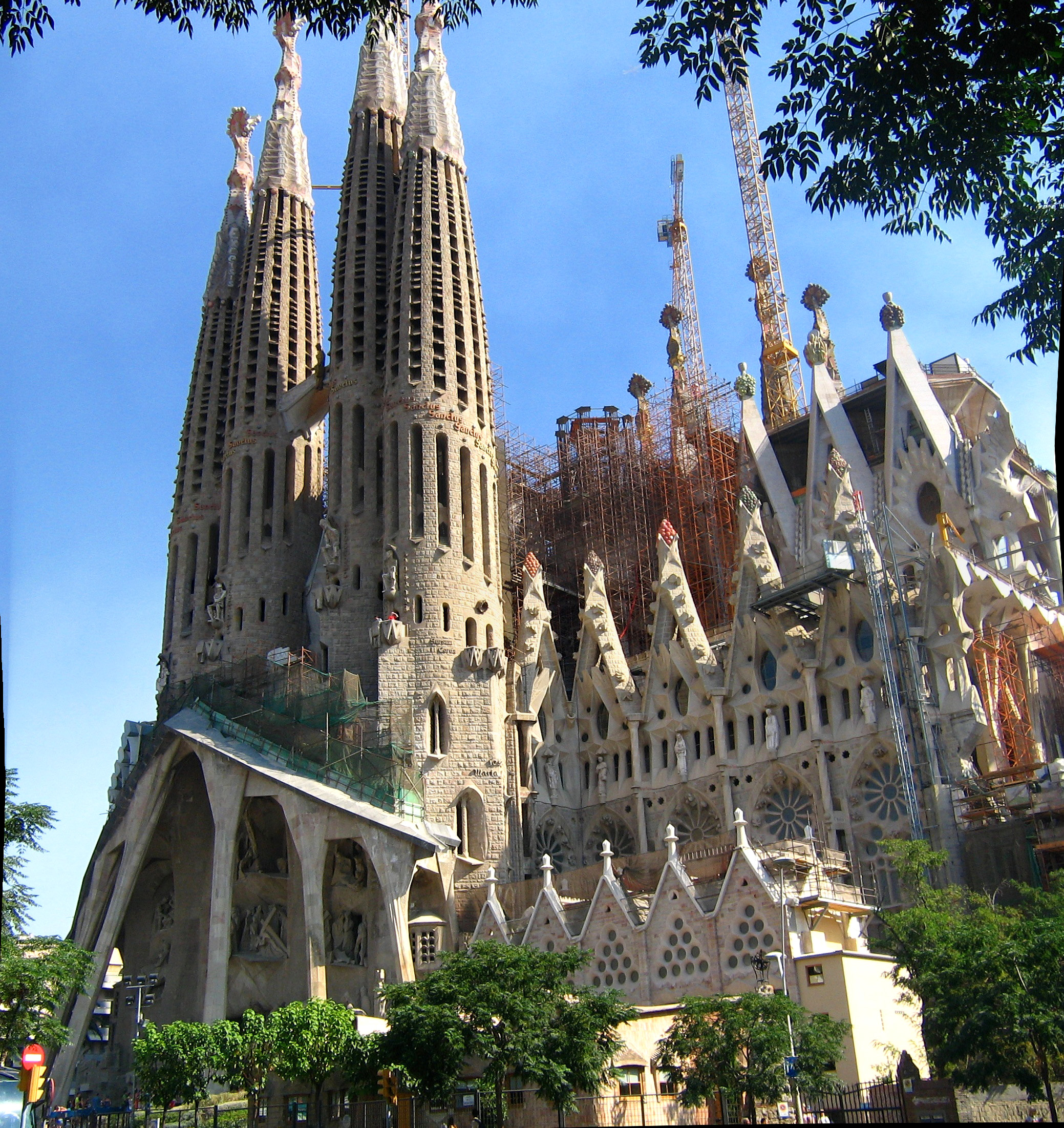 Sagrada Família church in Barcelona.